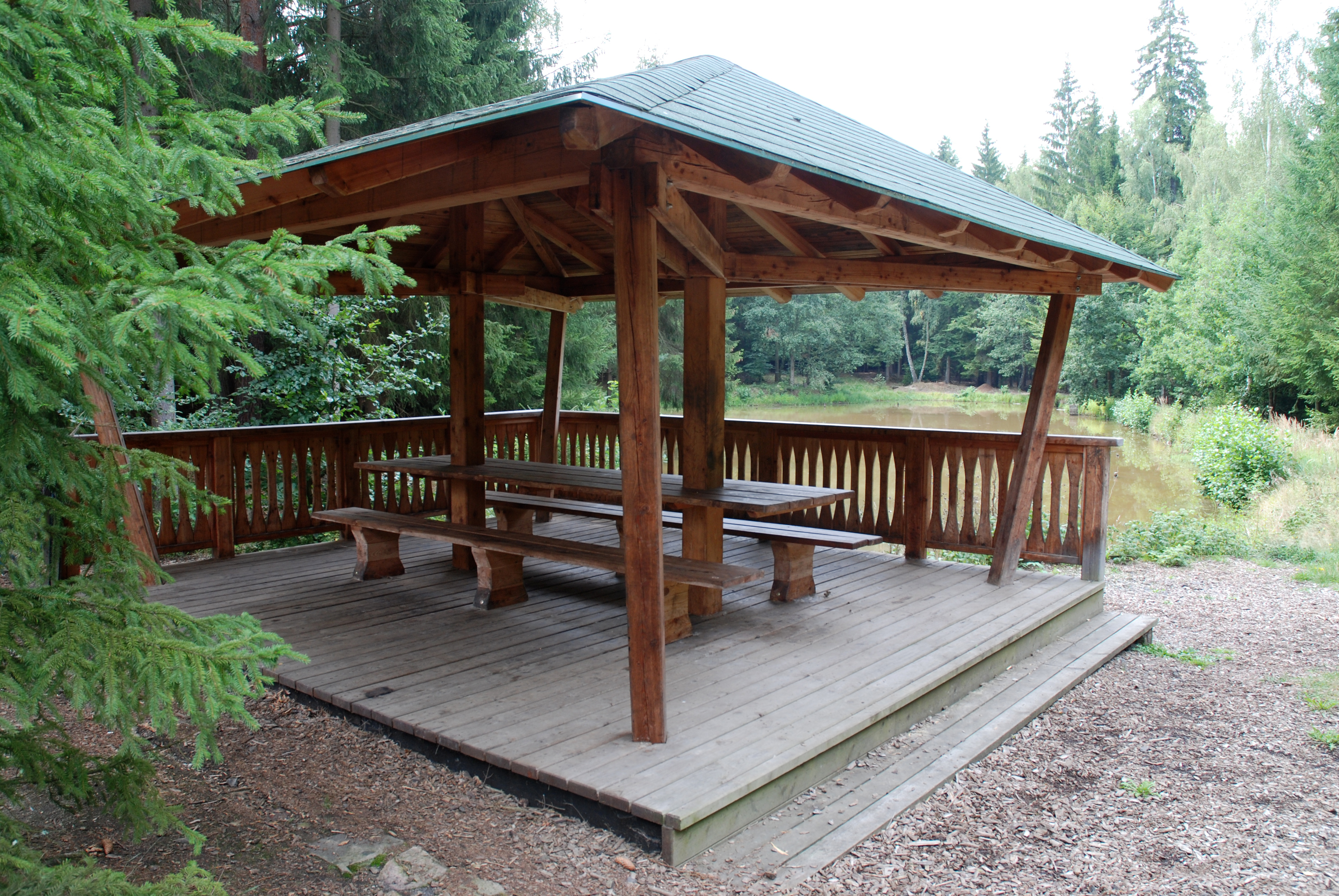 Altán Rybářská bašta u rybníku Linhart v karlovarských lázeňských lesích